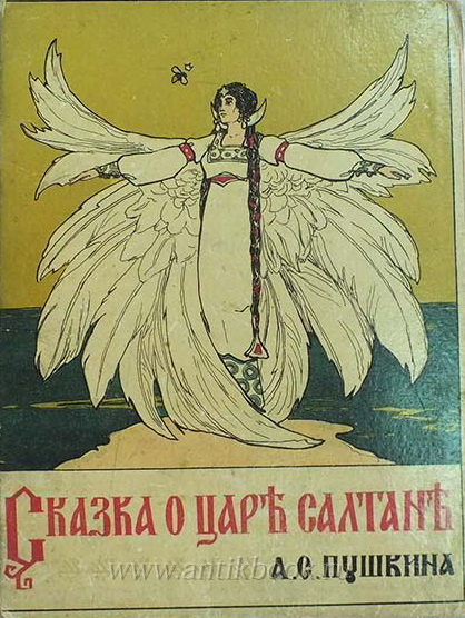 Сказка о царе Салтане, о сыне его славном и могучем богатыре князе Гвидоне Салтановиче и о прекрасной царевне Лебеди Пушкин А.С. 1916 год Москва, лит. т-ва И.Д.Сытина 54 стр., 21,3Х18,5 см. Иллюстрации, выполненные в технике хромолитографии, Н.Д. Бартрама. В издательской иллюстрированной (так же хромолитографированной) обложке.